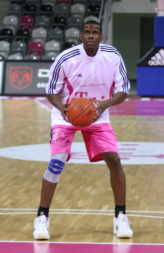 Patrick Flomo der Telekom Baskets Bonn